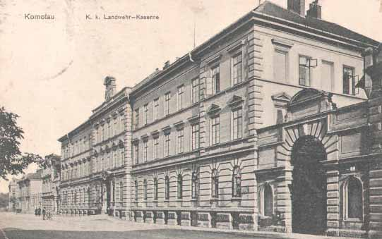 k.k. Landwehr Kaserne in Komotau